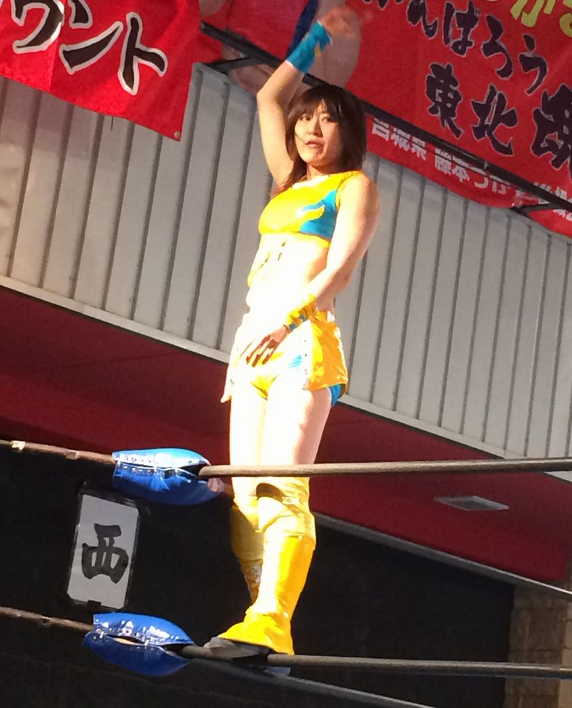 2014年アイスリボン大阪にて